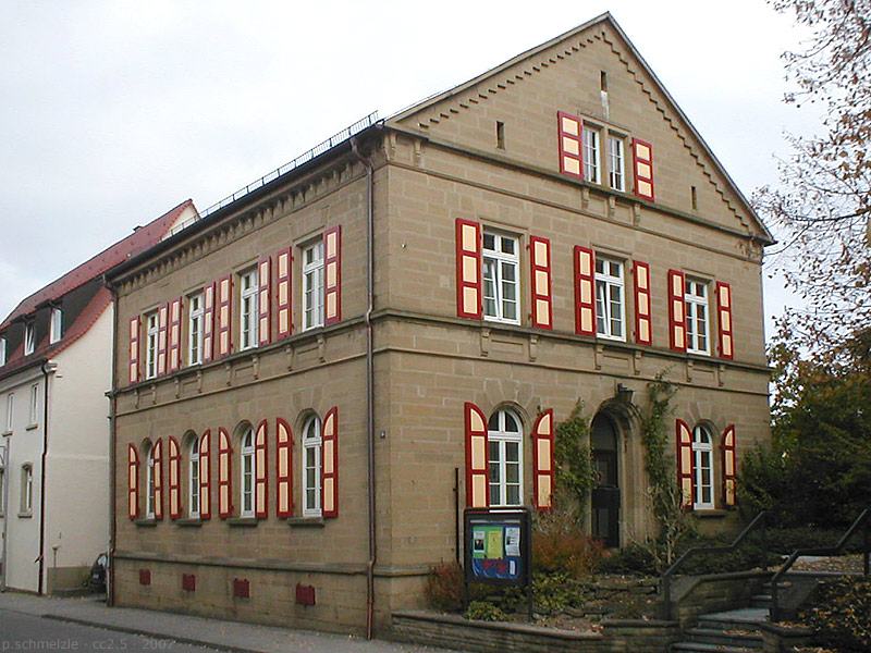 Evang. Pfarrhaus in Sulzfeld (Baden), Baden-Württemberg, Deutschland